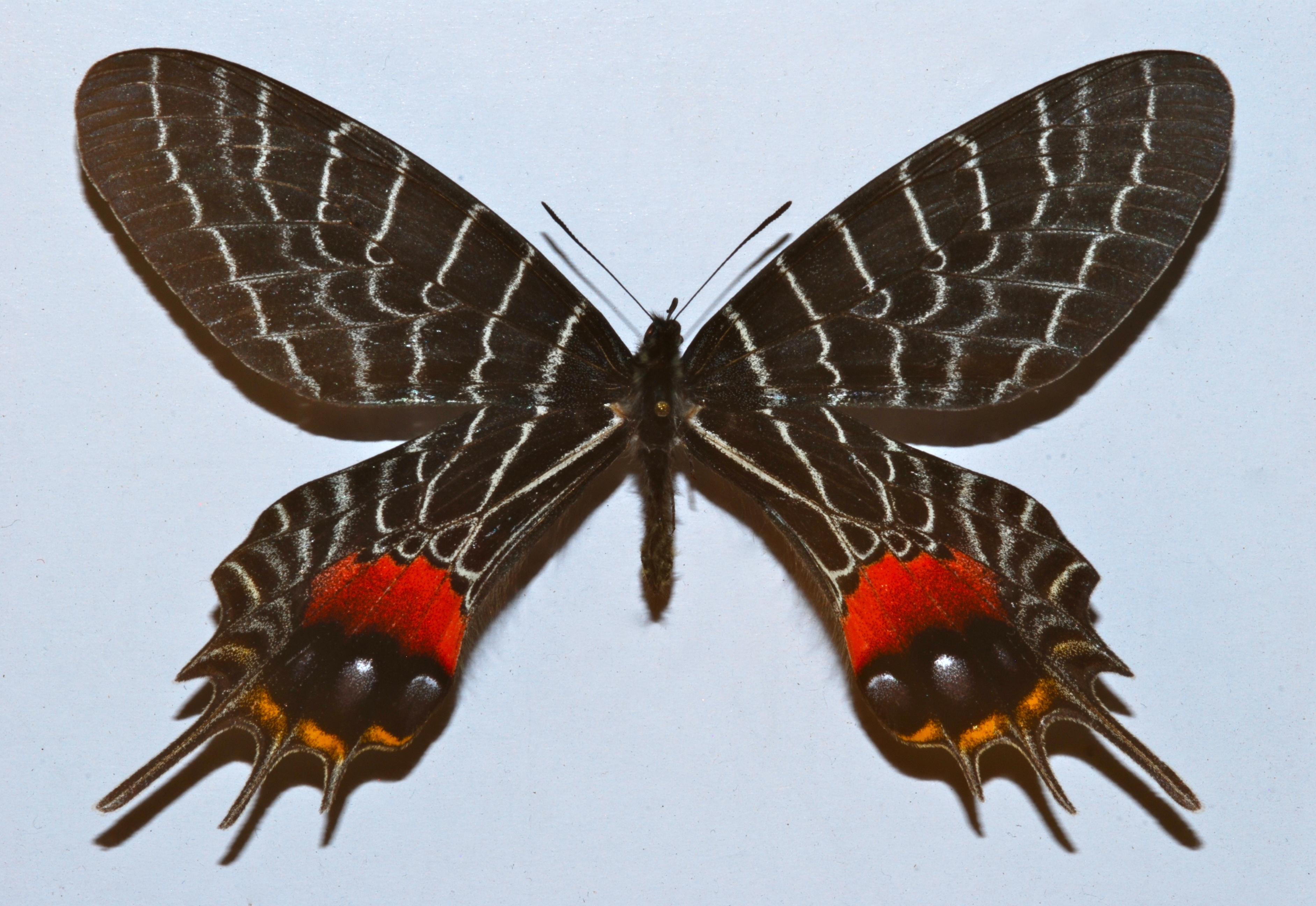 Lijian, Yunnan, CHINA